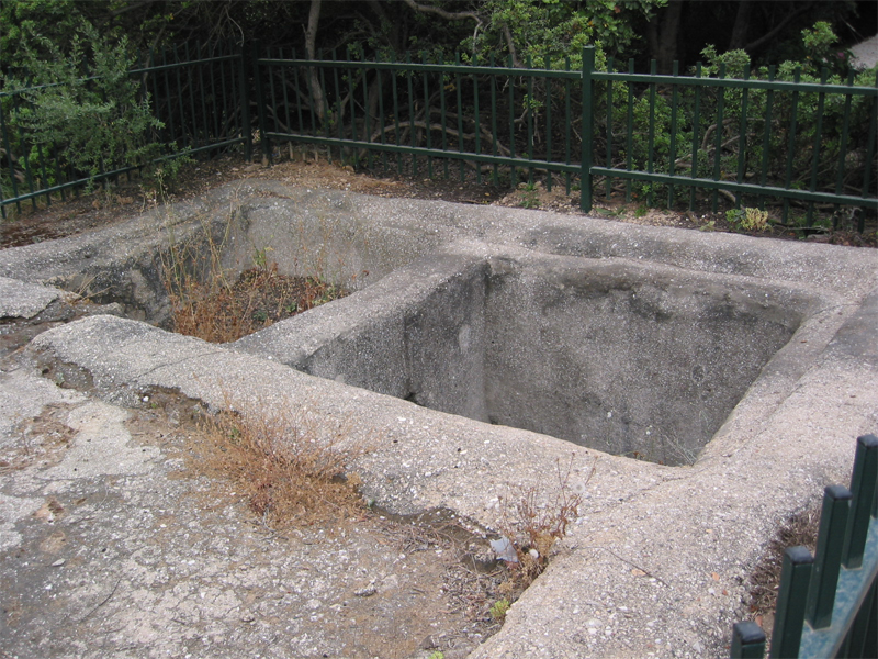 Gat garden, Israel